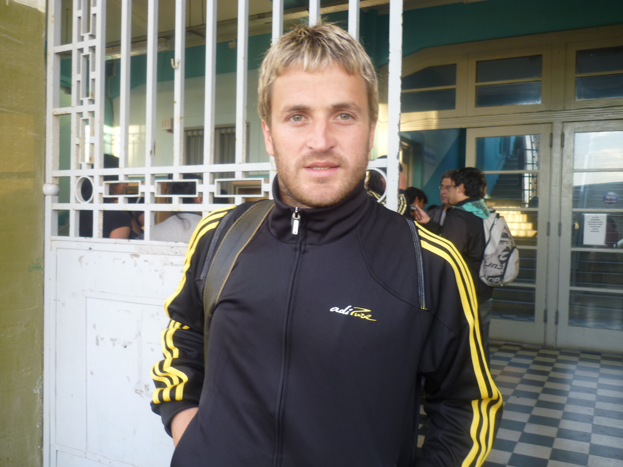 Fotografía de Pablo Darío López, jugador argentino del Santiago Wanderers de la Primera División de Chile.